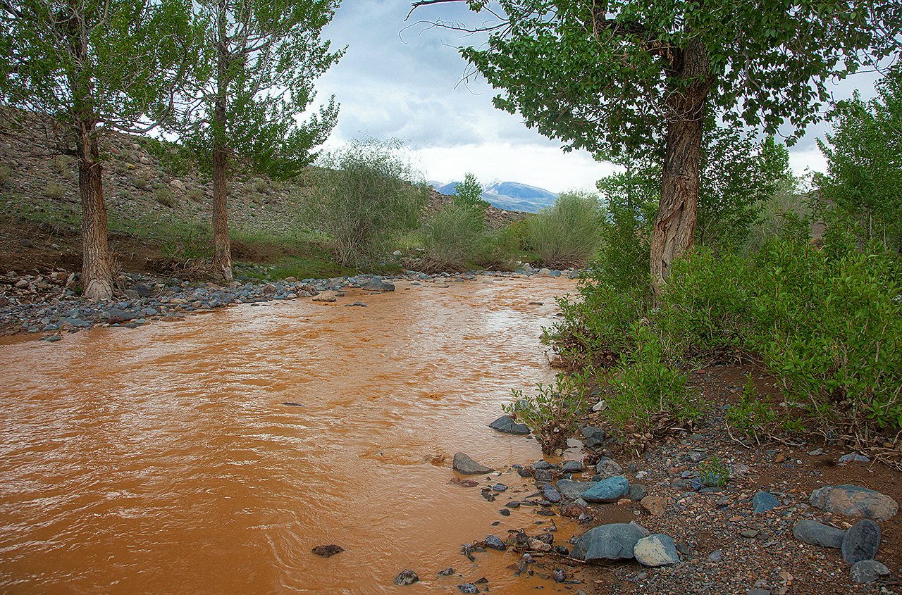 Река после дождя